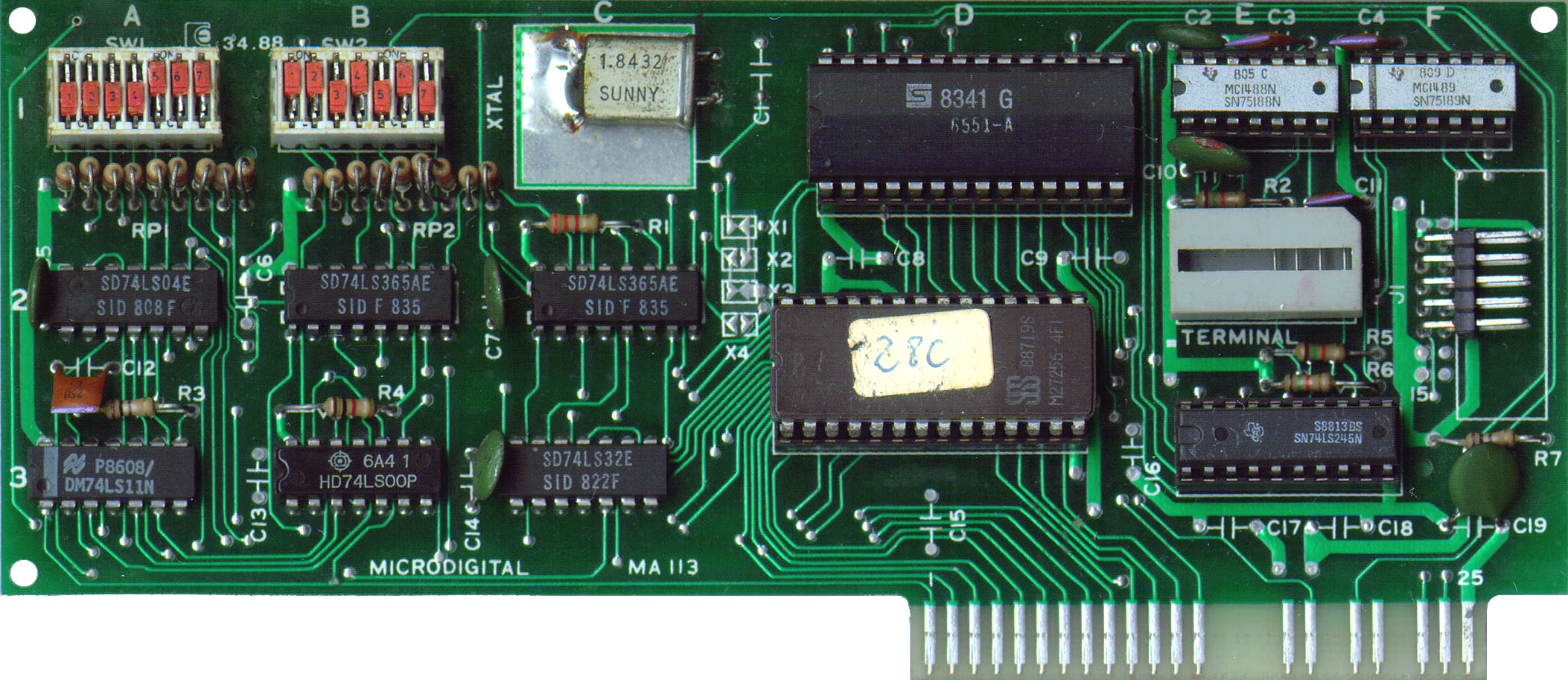 Placa de comunicação serial padrão RS-232, é cópia da placa homônima da Apple.